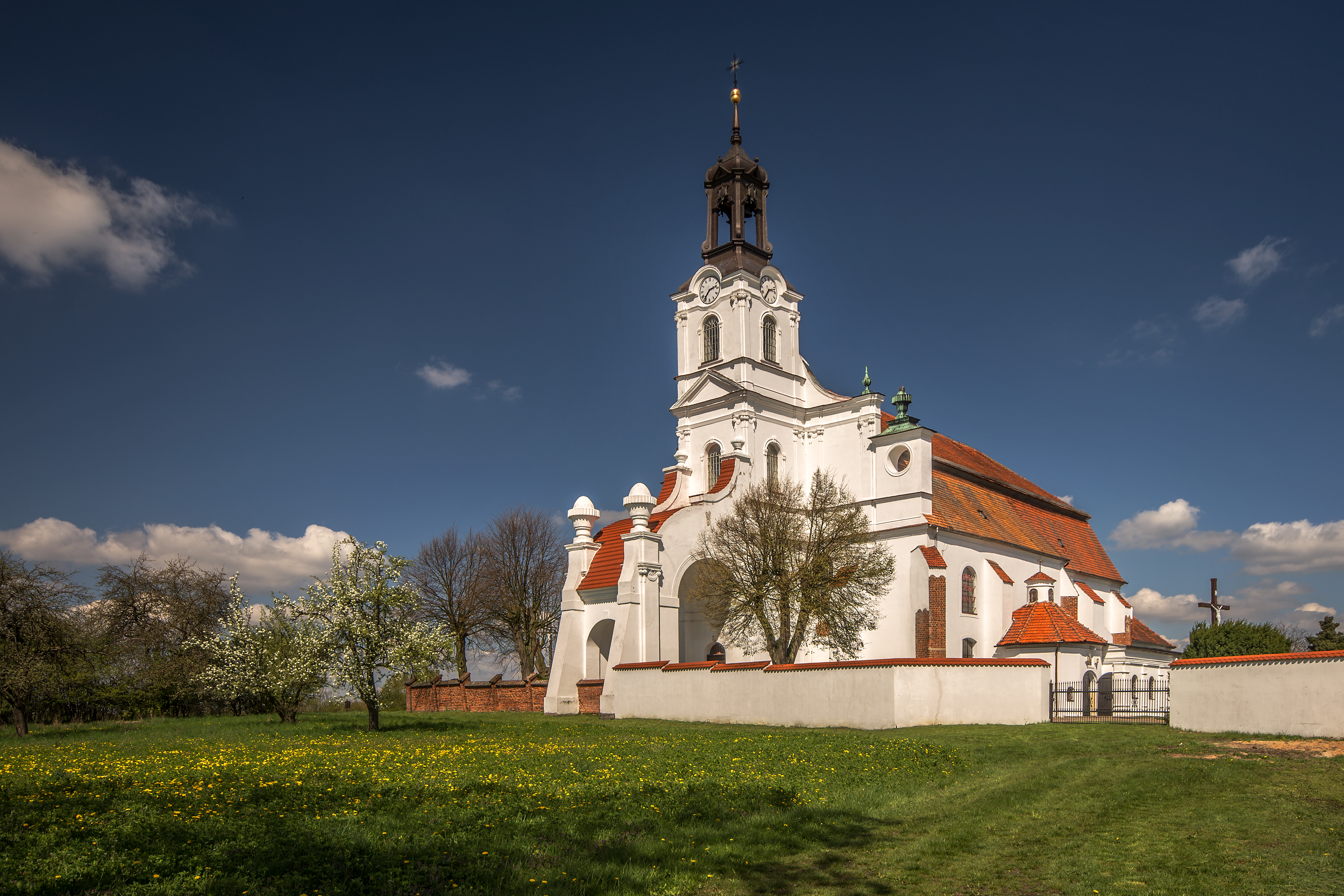 Ołobok, kościół, ob. par. p.w. św. Jana Ewangelisty, XV/XVI, 1695, 1802